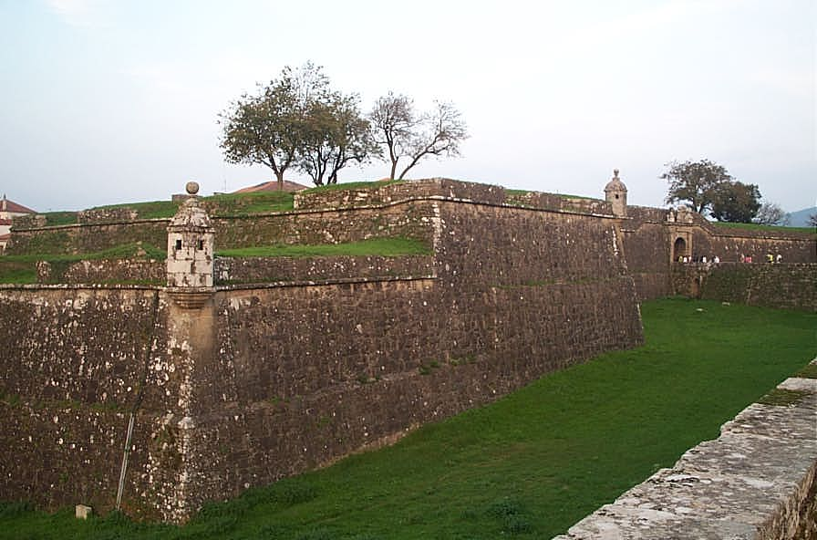 Vista de las murallas de la Fortaleza emValença do Miño - Alquiler de coches en Portugal